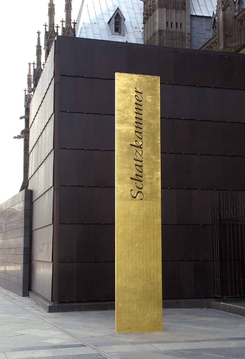 Domschatzkammer Cologne, at Kölner Dom, entrance author: Elke Wetzig (elya) date: 2006-04-08